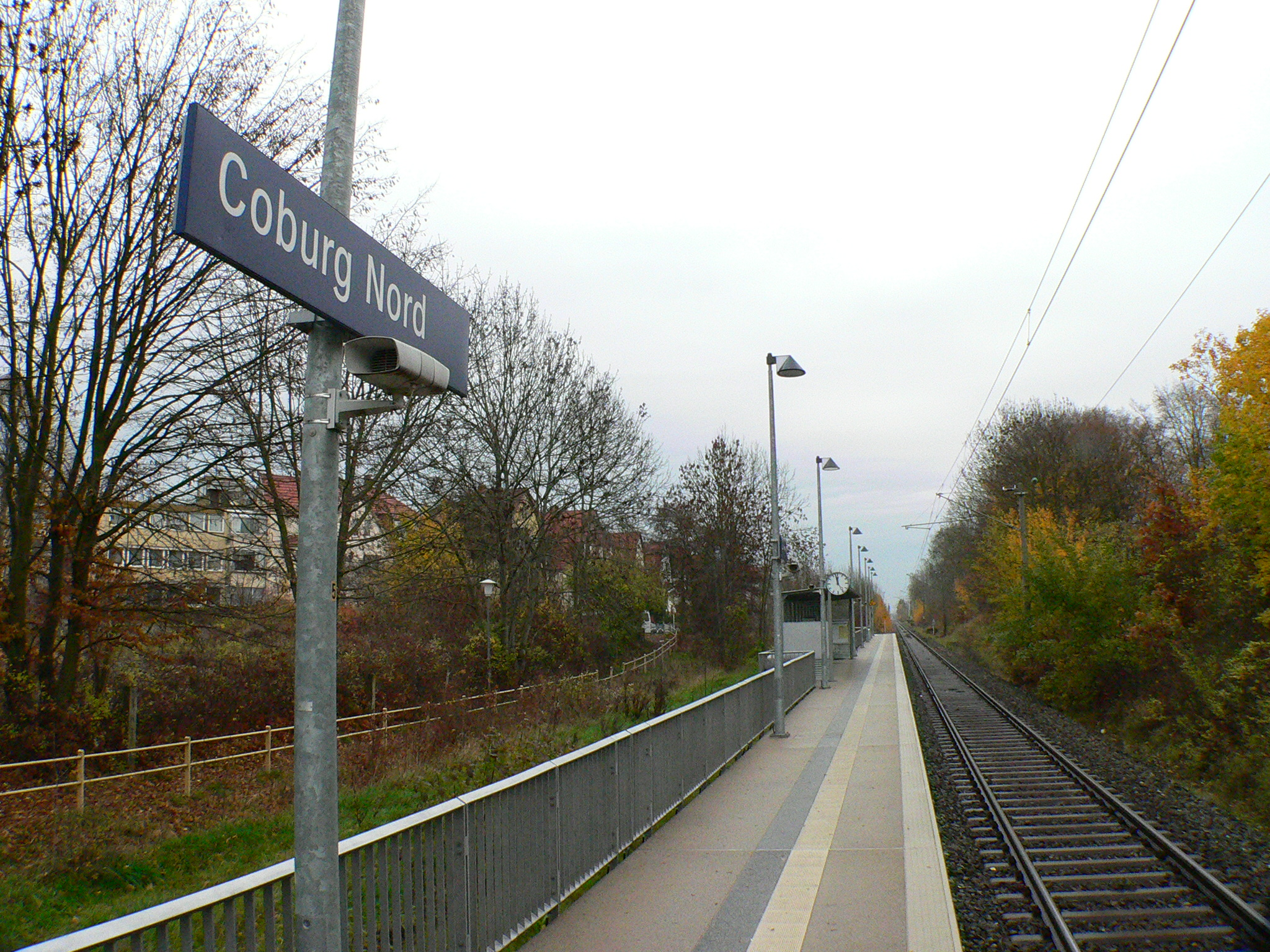 Haltestelle Coburg-Nord der Bahnline Coburg-Sonneberg